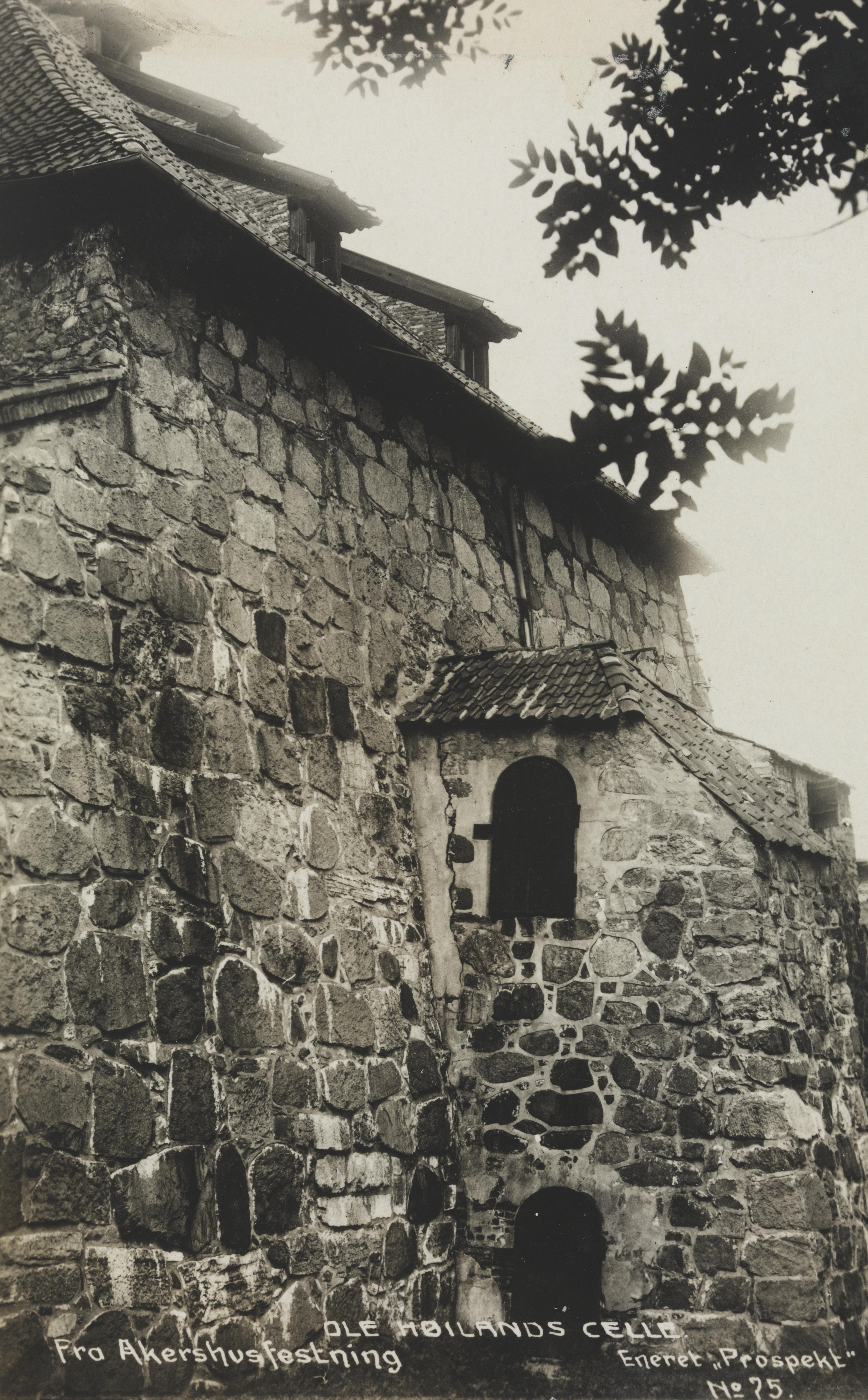 Bildet er hentet fra Nasjonalbibliotekets bildesamling Akershus festning, Oslo, Oslo